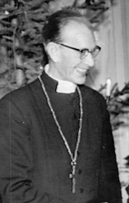 Landsarktvarie Hasse Petrini och makan Brite gjorde nyårsvisit hos biskopsparet Anne-Marie och Ruben Josefson i Härnösand.Fyra småflickor, barnbarn i residenset, och en hund, Pontus, vakthavande i biskopsgården, var viktiga ingredienser vid nyårsuppvaktningarna hos landshövding och biskop i Härnösand. Innevånarna i den livliga med idylliska staden vid Ångermanälvens utflöde är mycket visitglada, och det är åtskilliga hundra som ser till att traditionerna vid nyår hålls vid liv. Man går till landshövding och biskop, och många fortsätter sedan. Det finns de som först hinner runt på fyra nyårsvisiter och sedan går hem för att ha en egen mottagning.